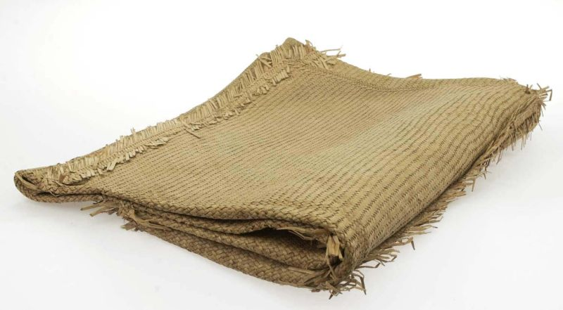 Mat. Gevlochten zit- of slaapmat van plantenvezels